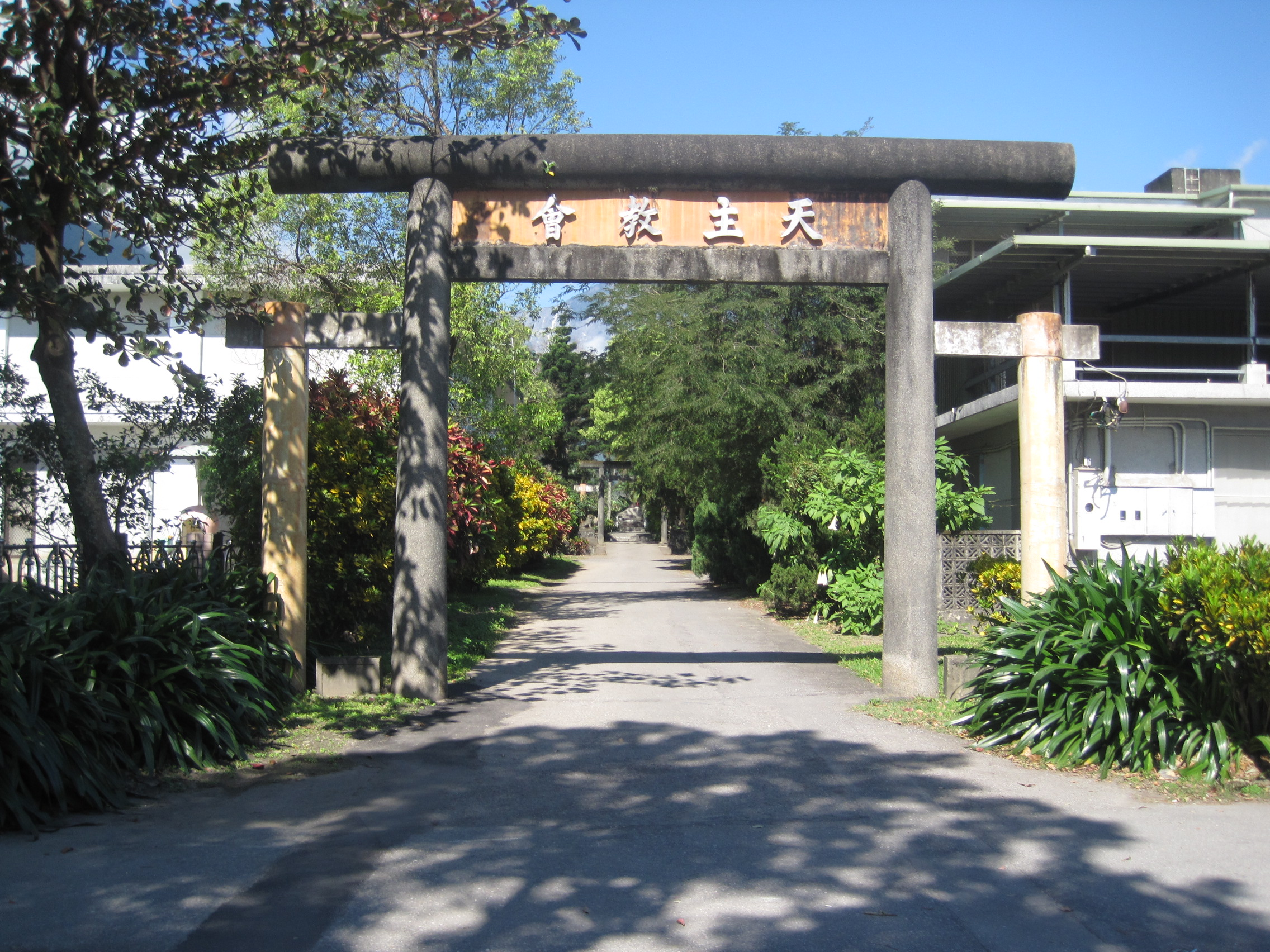 新城社鳥居